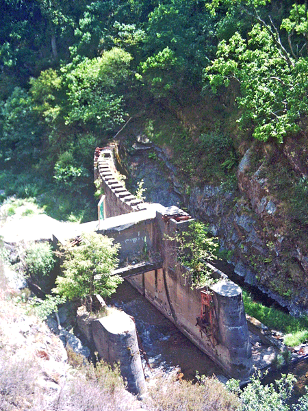 Imagen de las ruinas del antigua embalse